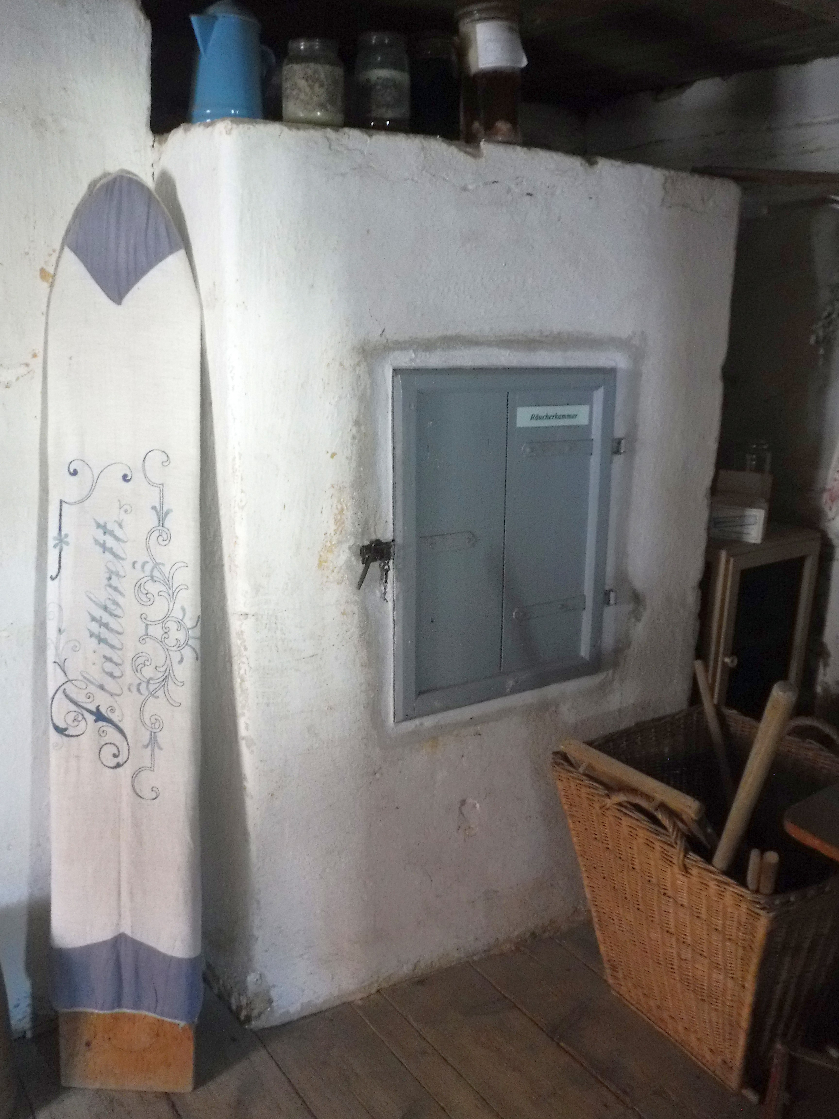 Plättbrett und Räucherkammer im Kleinbauernmuseum Dresden-Reitzendorf